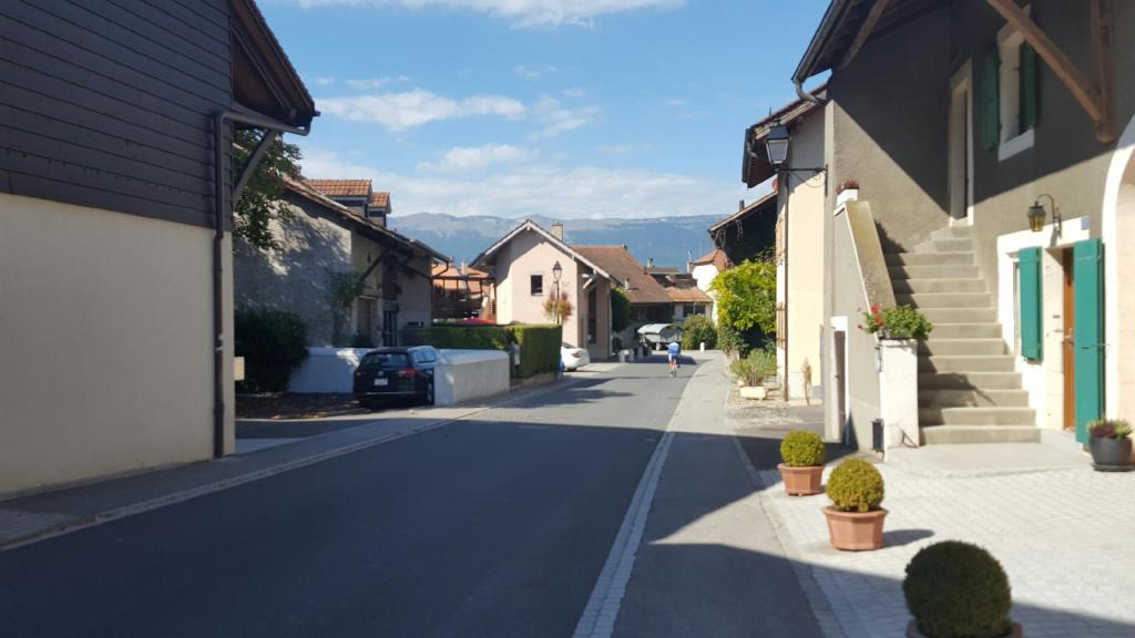 Aire-la-Ville, Genf, Strassenbild